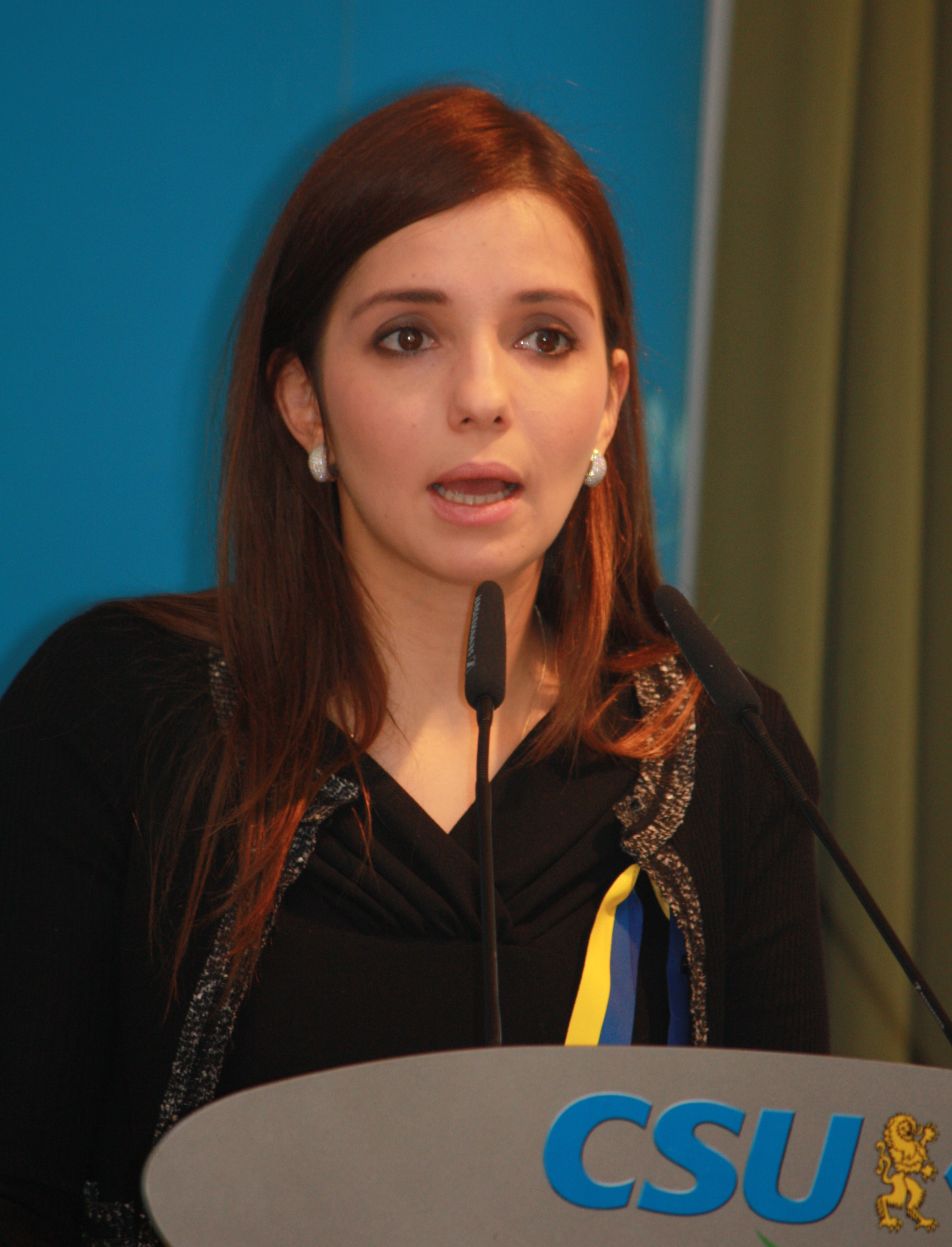 Jewhenija Timoschenko bei der Landesdelegiertenversammlung des Außenpolitischen Arbeitskreises (ASP) der CSU